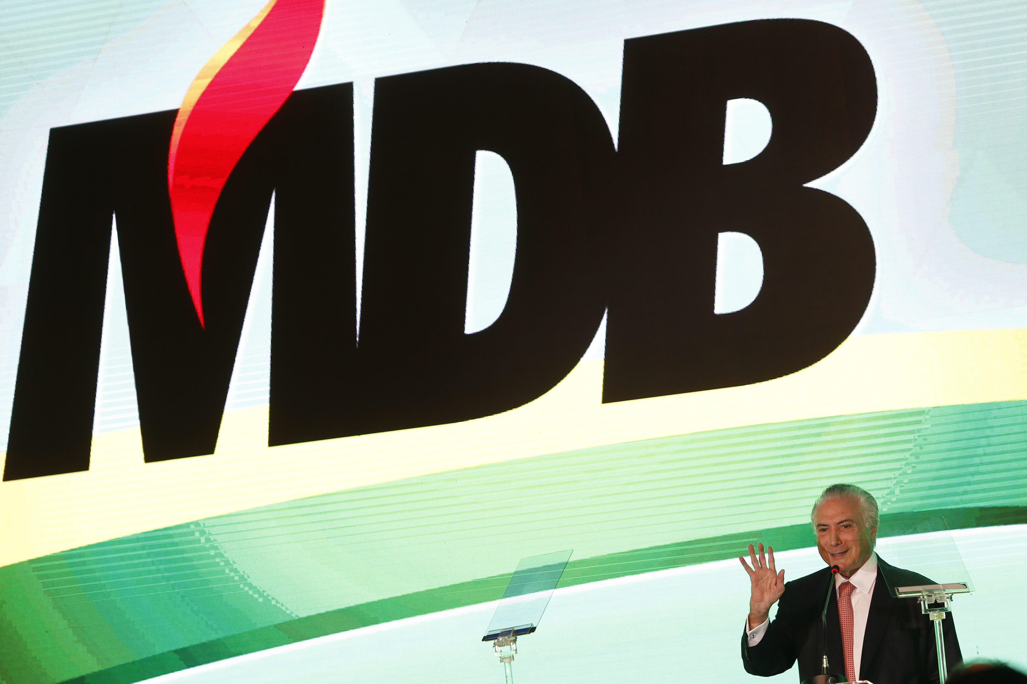 Convenção Nacional do PMDB. Presidente da República Senhor Michel Temer. Foto: Igo Estrela/PMDB Nacional